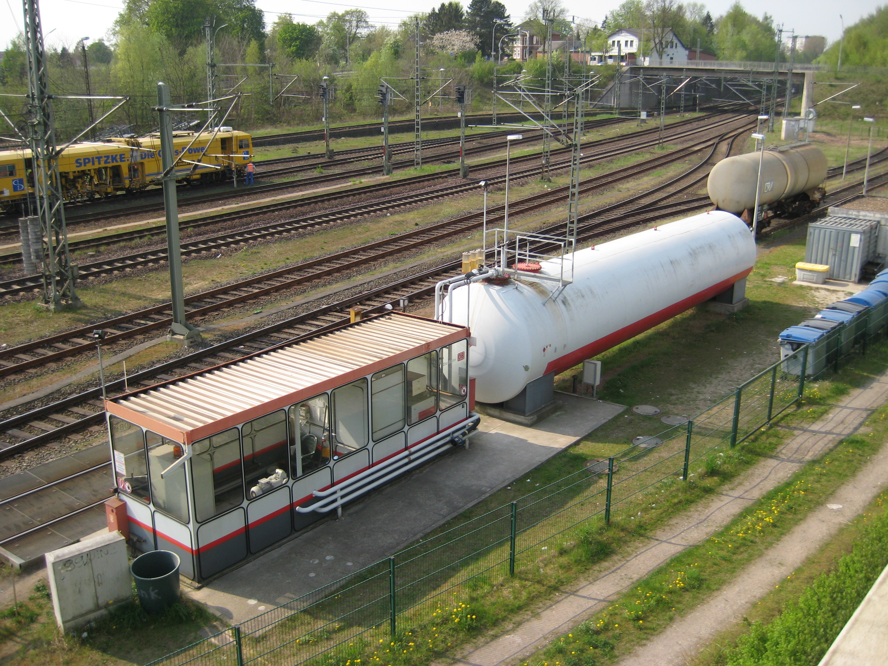 Gelände des ehemaligen Bahnbetriebswerkes in Itzehoe